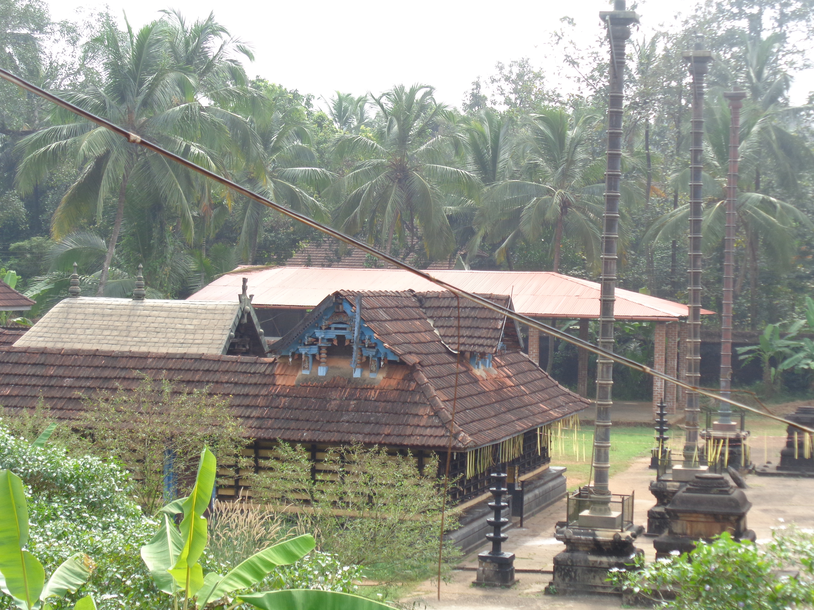 karikkkad subrahmanya temple- a view of ayyappa temple from south